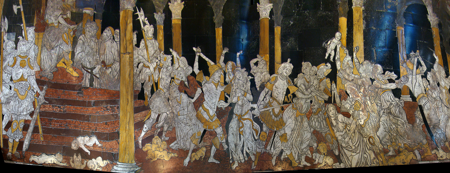 Marble mosaic floor